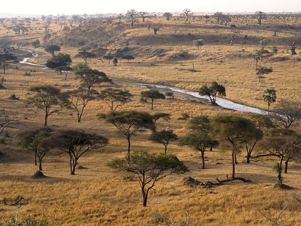 ทุ่งหญ้าสะวันนาในแอฟริกา